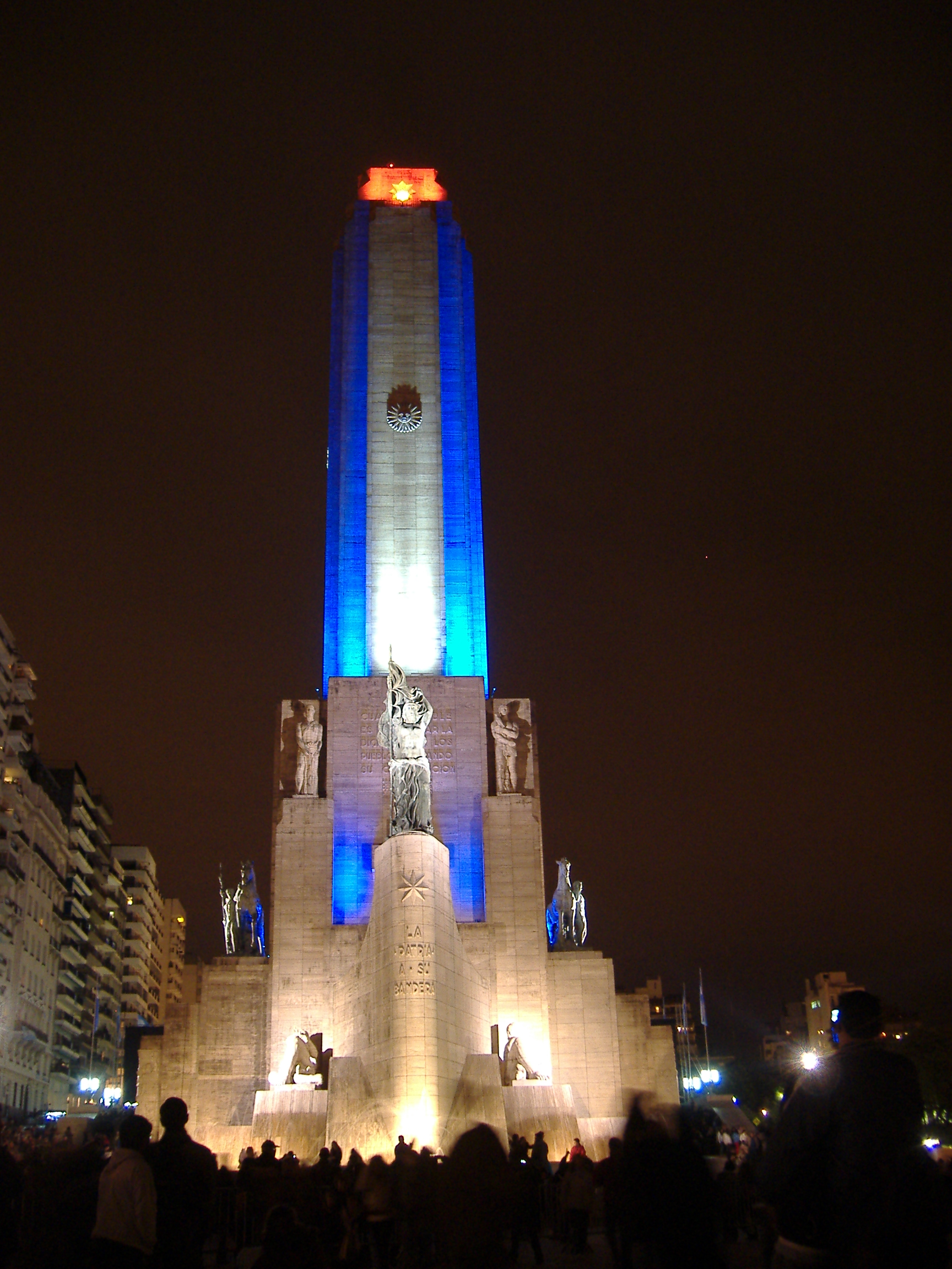 National Flag Memorial (Monumento Nacional a la Bandera), Rosario, Argentina.